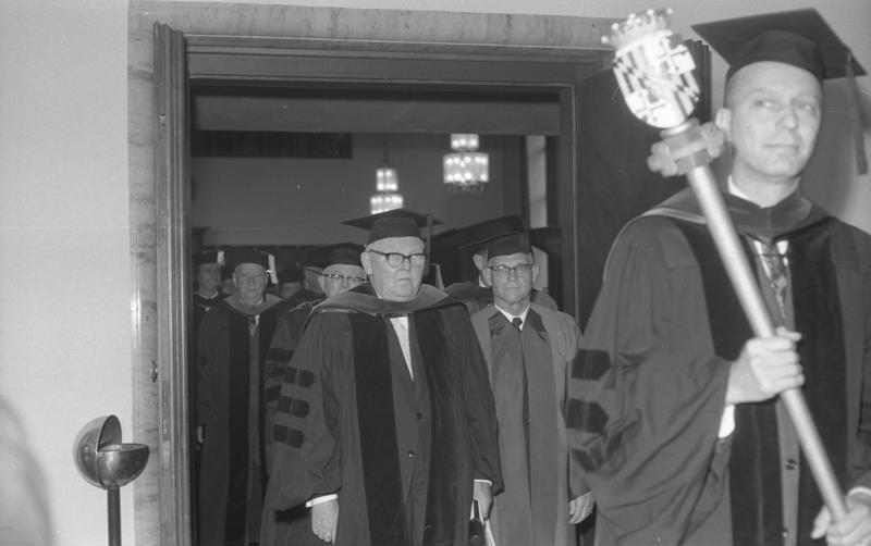 Ehrendoktorwürde der Maryland-Universität in Heidelberg an Bundeskanzler Prof. Erhard